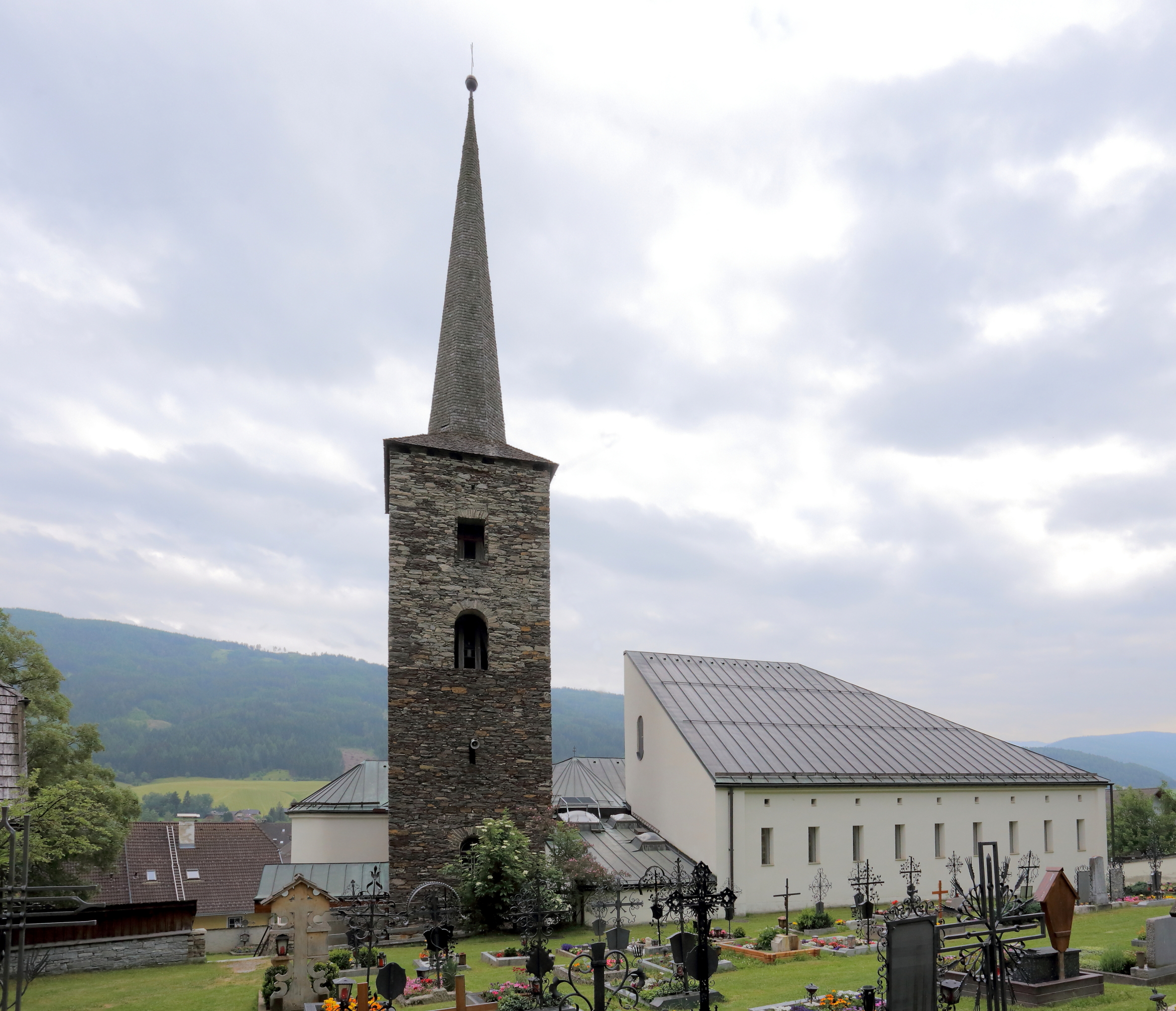 Katholische Pfarrkirche hl. Ulrich in der Salzburger Gemeinde Unternberg. Die Kirche ist nach Plänen von Heinz Tesar in den Jahren 1978/79 zum Teil neu errichtet worden.